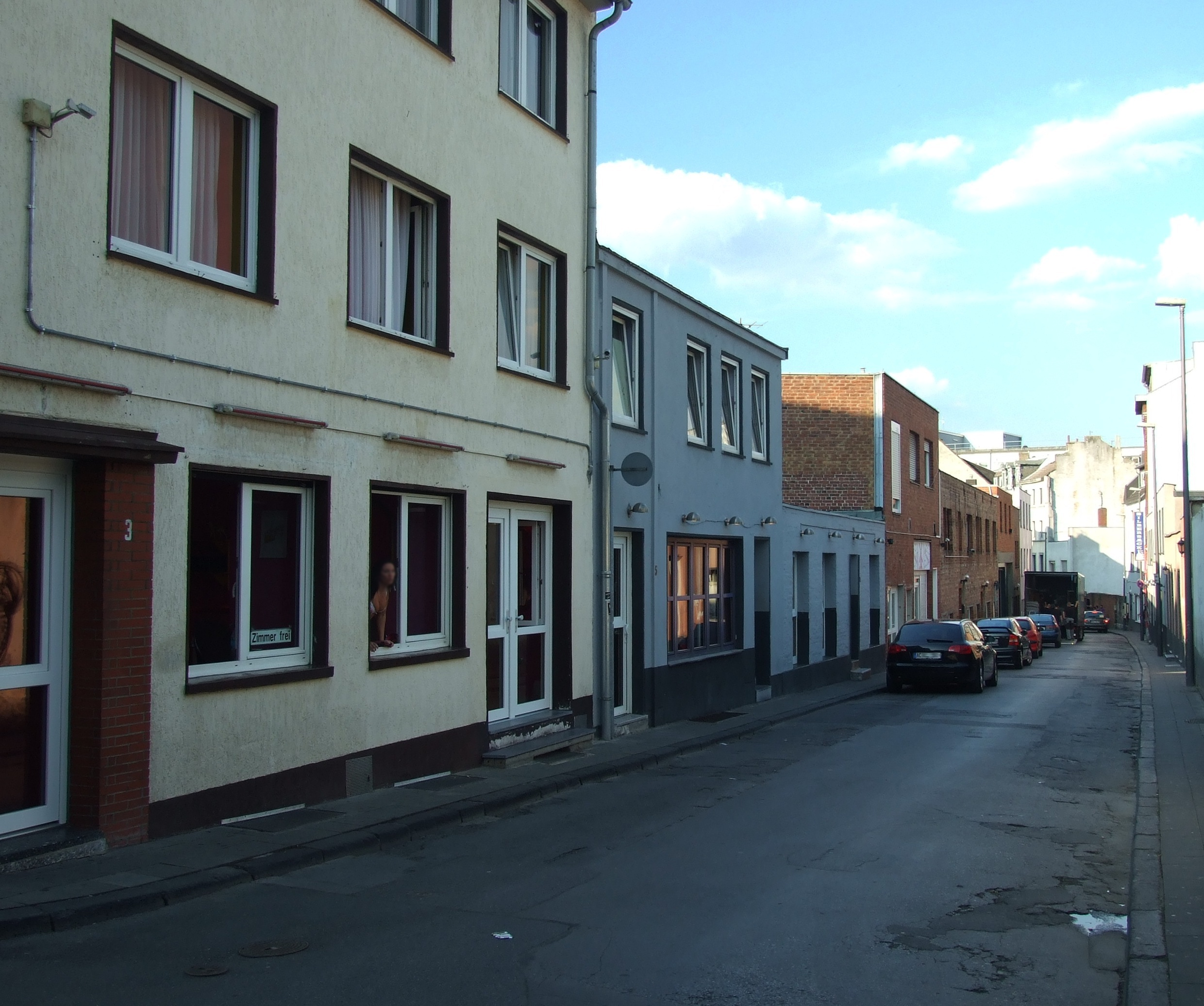 Antoniusstraße in Aachen